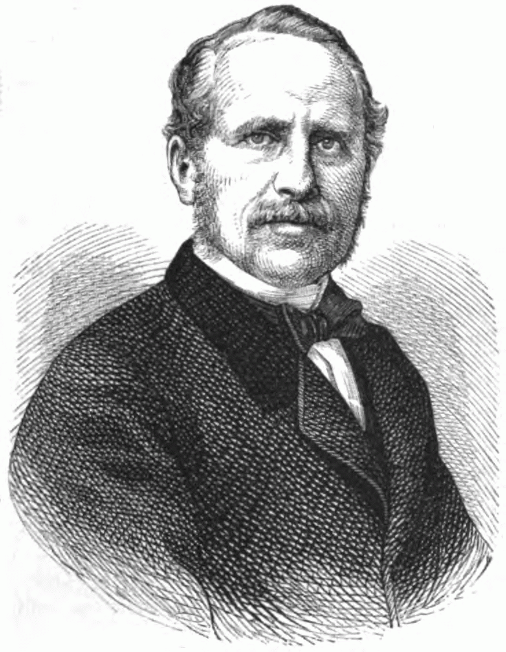 Adolf Ignaz Ritter von Tschabuschnigg (1809 bis 1877), österreichischer Politiker und Dichter